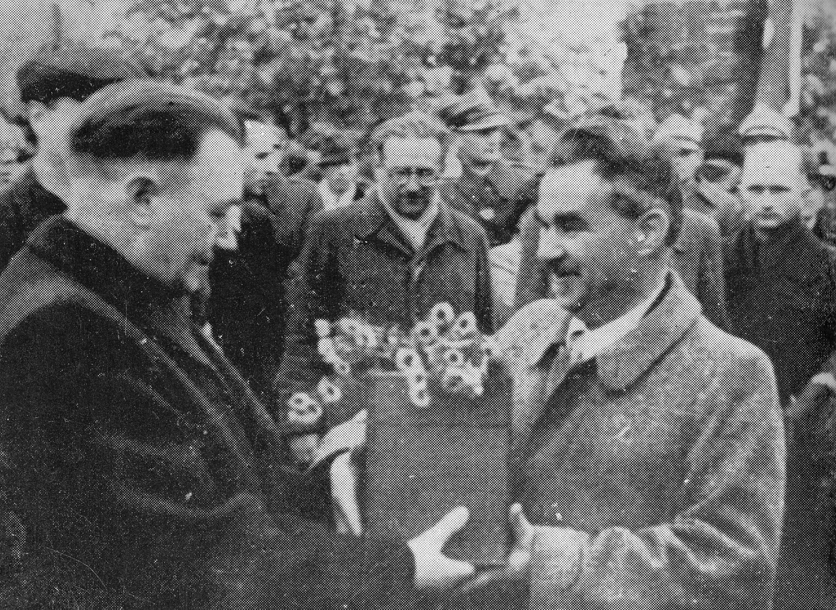 Powrót do Warszawy urny z sercem Fryderyka Chopina przechowywanej w Milanówku. Prezydent Bolesław Bierut wręczający urnę prezydentowi m.st. Warszawy Stanisławowi Tołwińskiemu